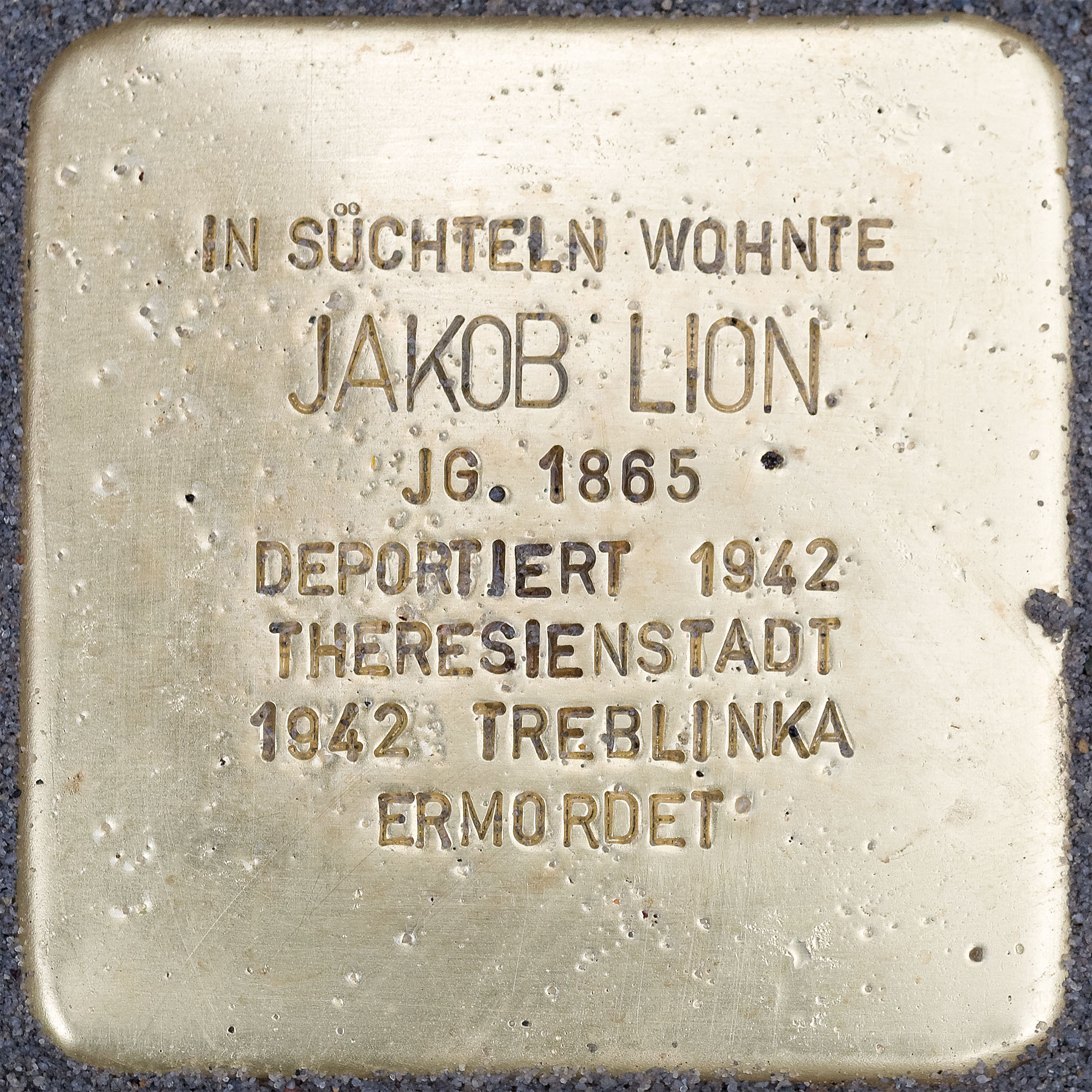 Stolpersteine Suechteln: Lion, Jakob